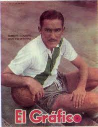 Futbolista ídolo de Banfield.